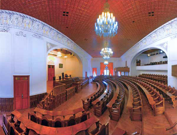 جایگاه نمایندگان و هیات رییسه مجلس شورای ملی